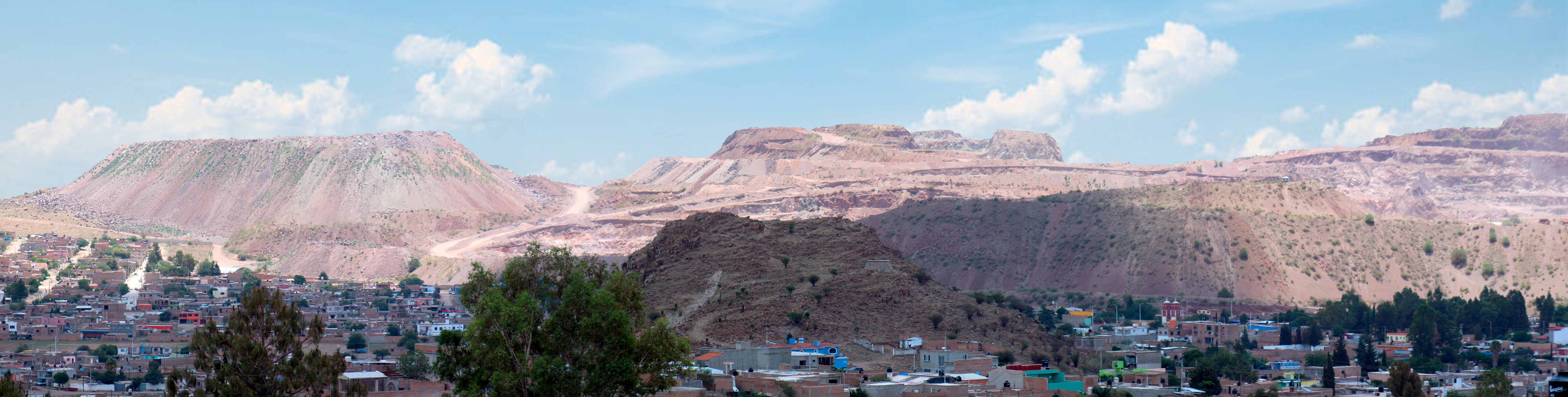 Situación actual del Cerro de Mercado